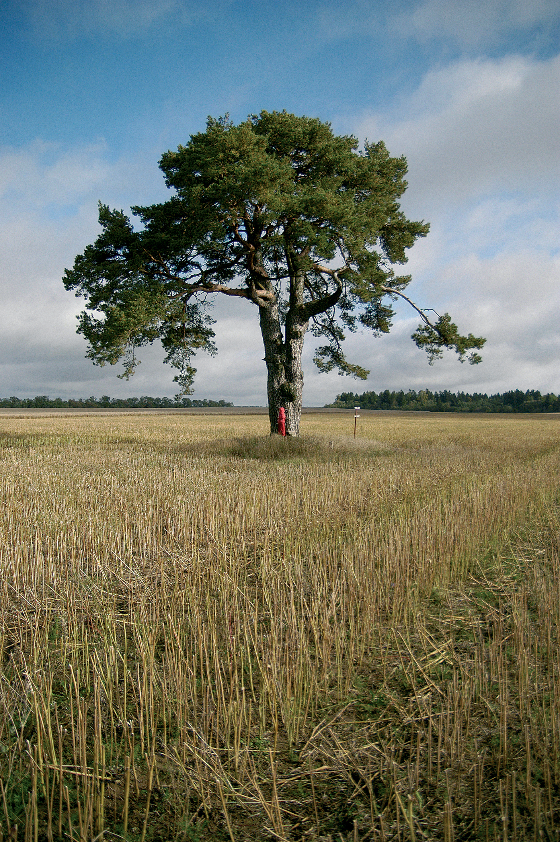 Kallukse hiiemänd